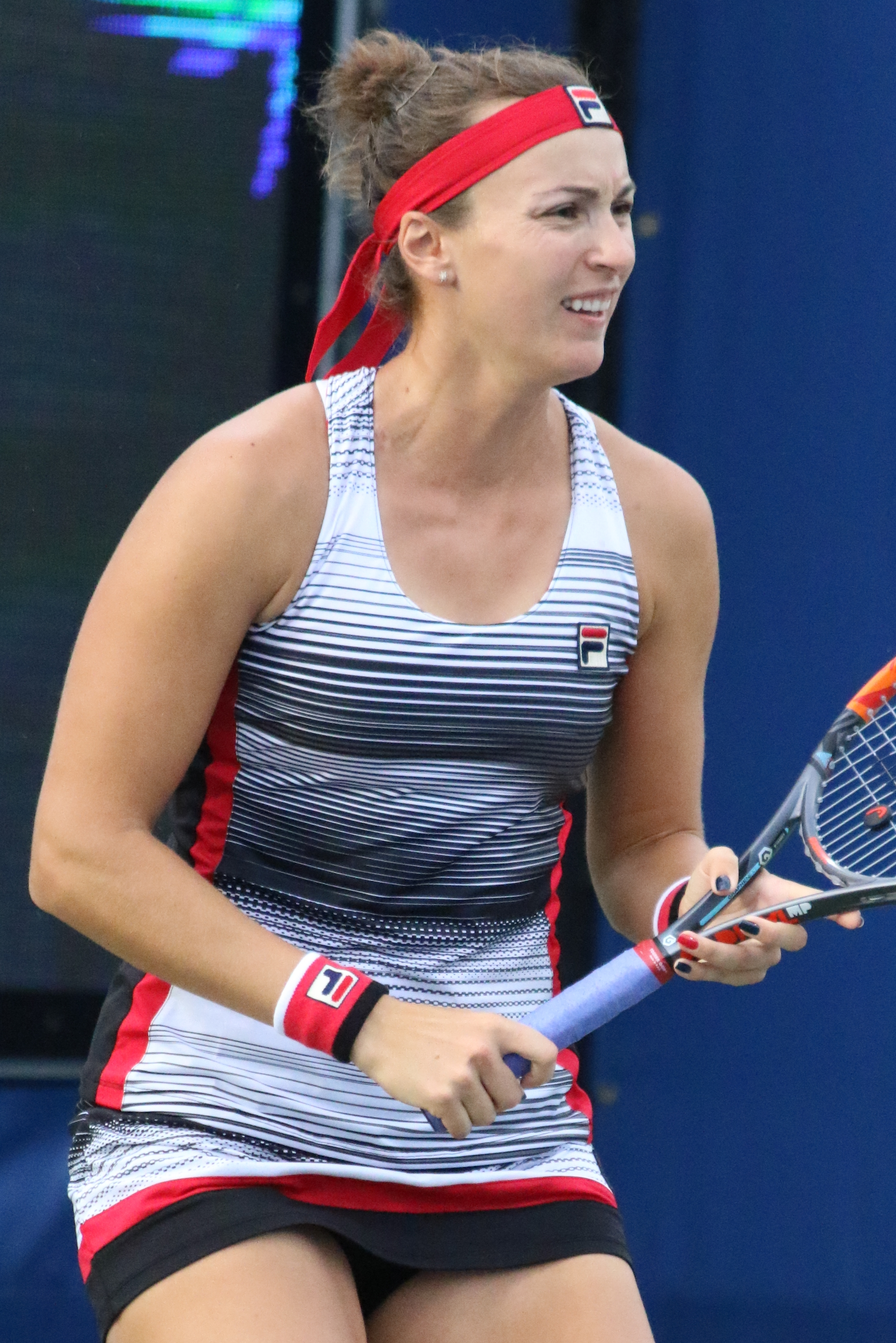 Shvedova US16 (8)